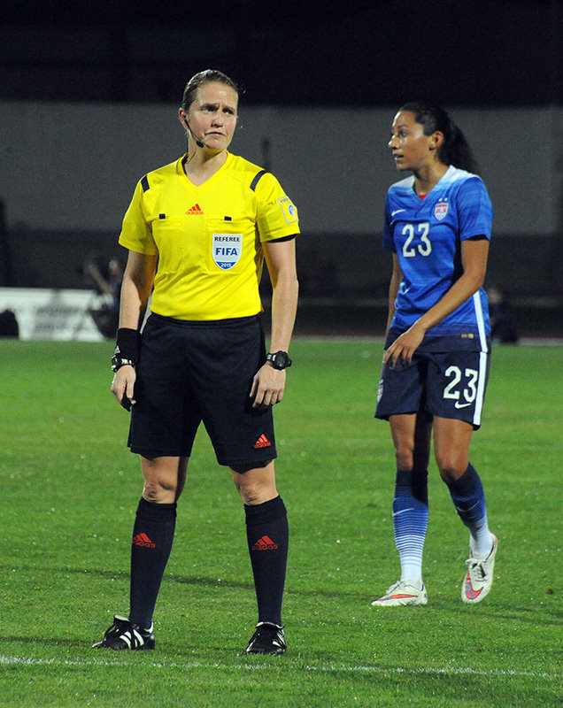 a_8_5443